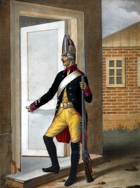 Фузелер С.-Петербургского Гренадерского полка. 1797-1801. (В летней форме.)